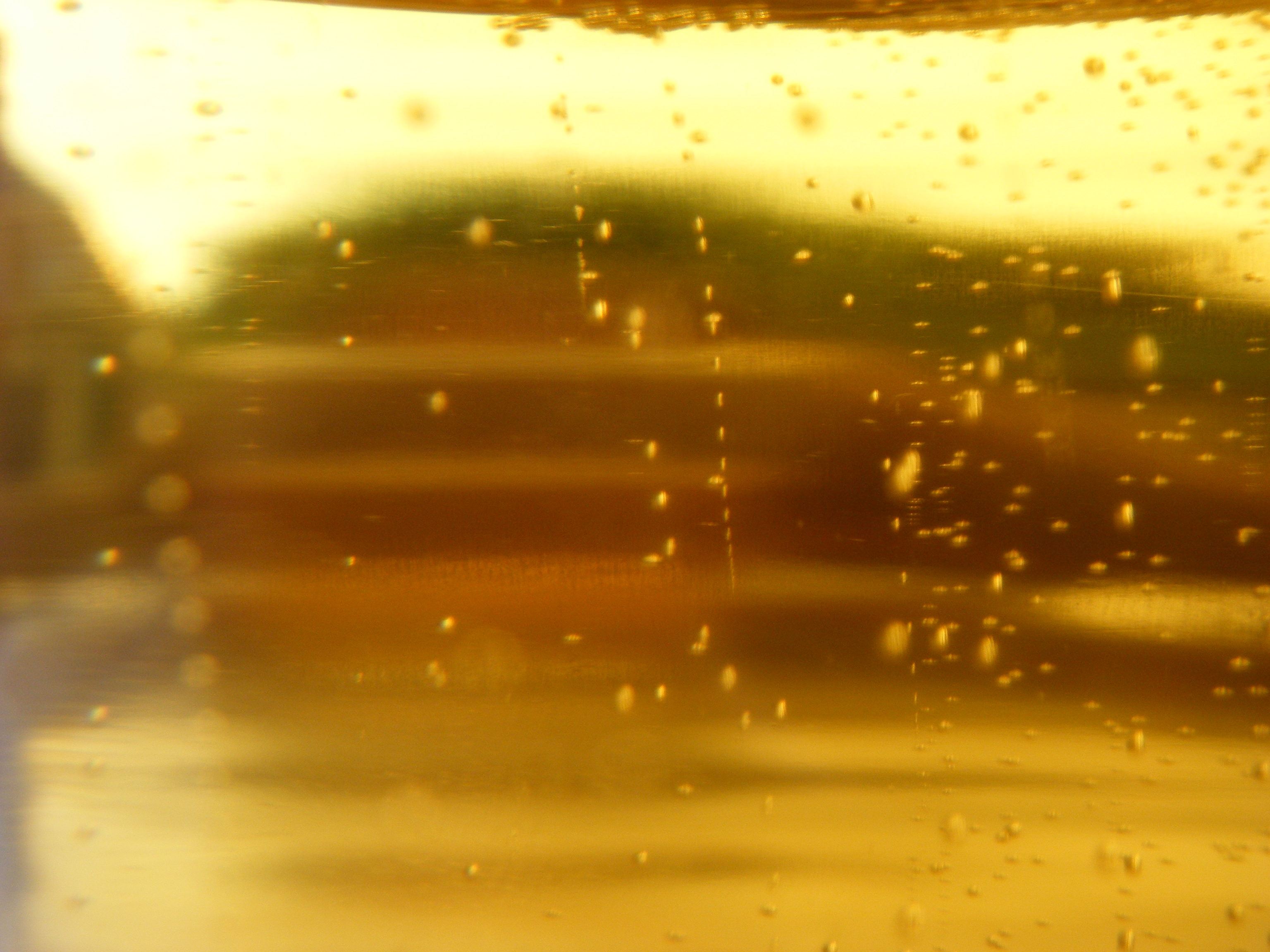 bulles de cidre dans un verre / Cider bubbles